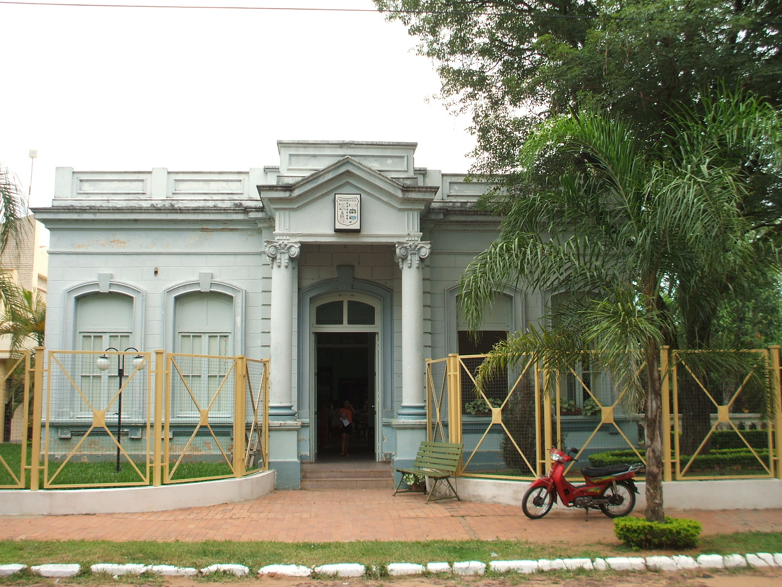 Municipalidad